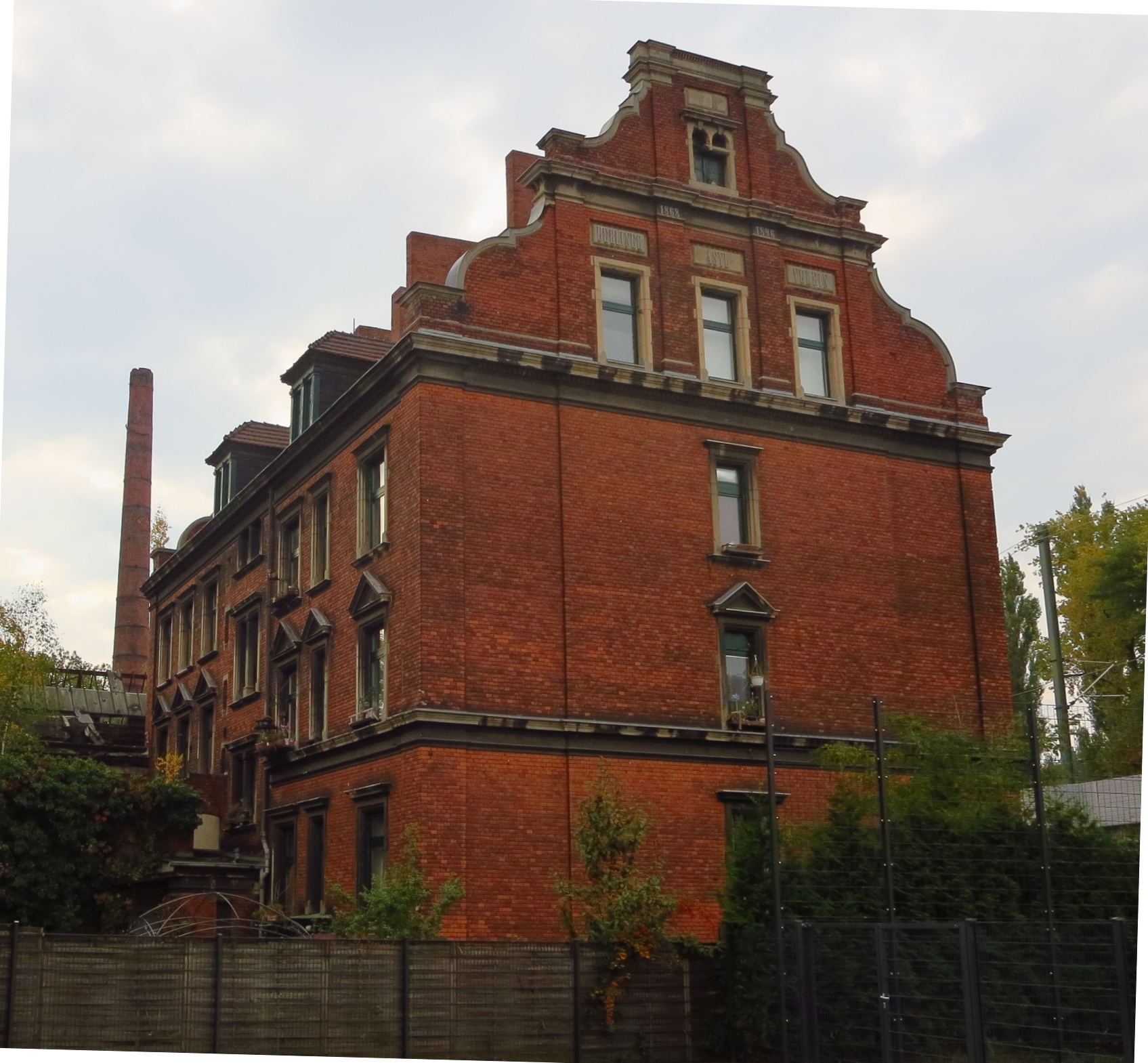 Asyl für Obdachlose ("Wiesenburg") in der Wiesenstrasse 55 (Berlin-Gesundbrunnen)